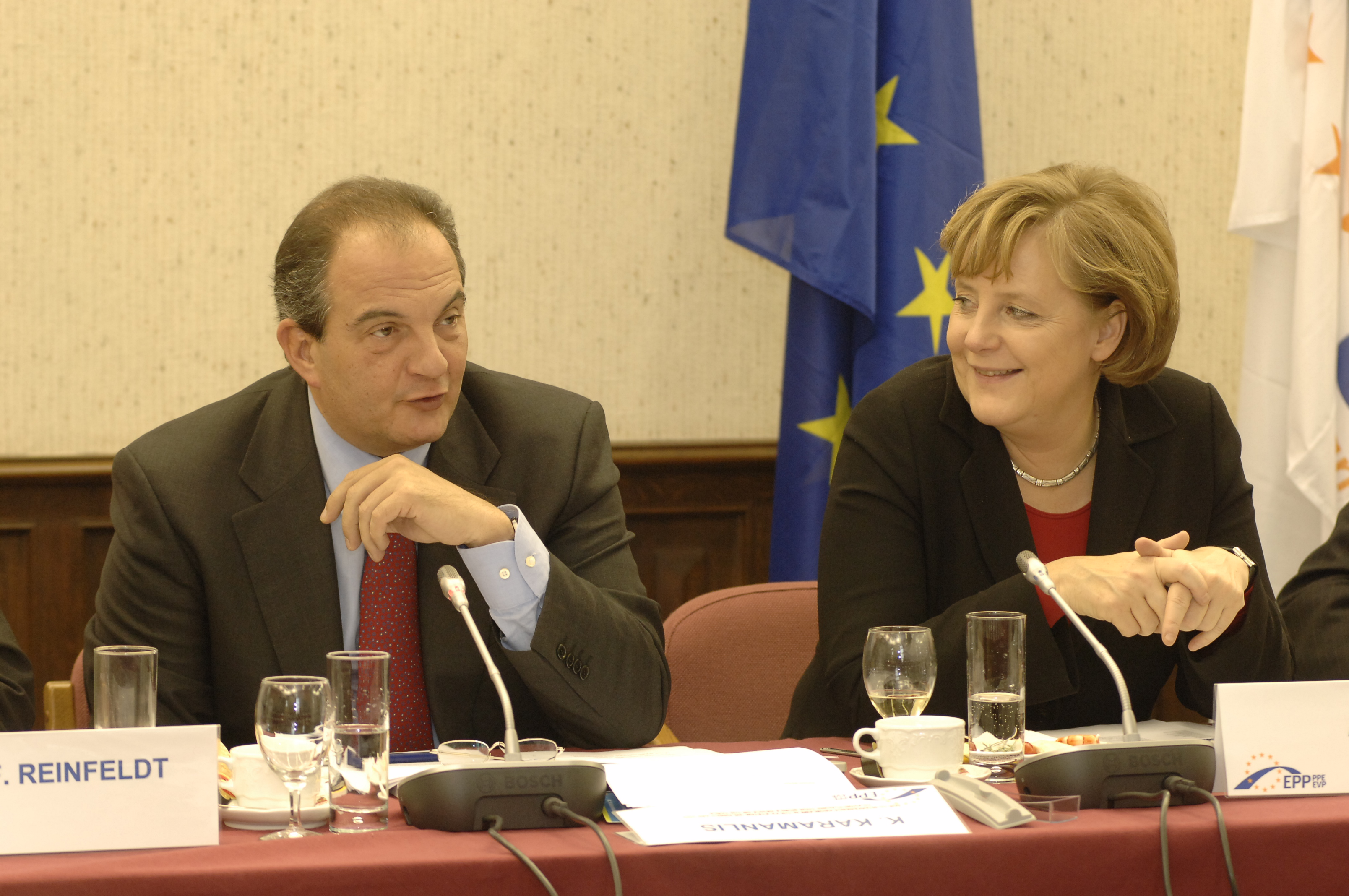 EPP Summit 14 December 2006